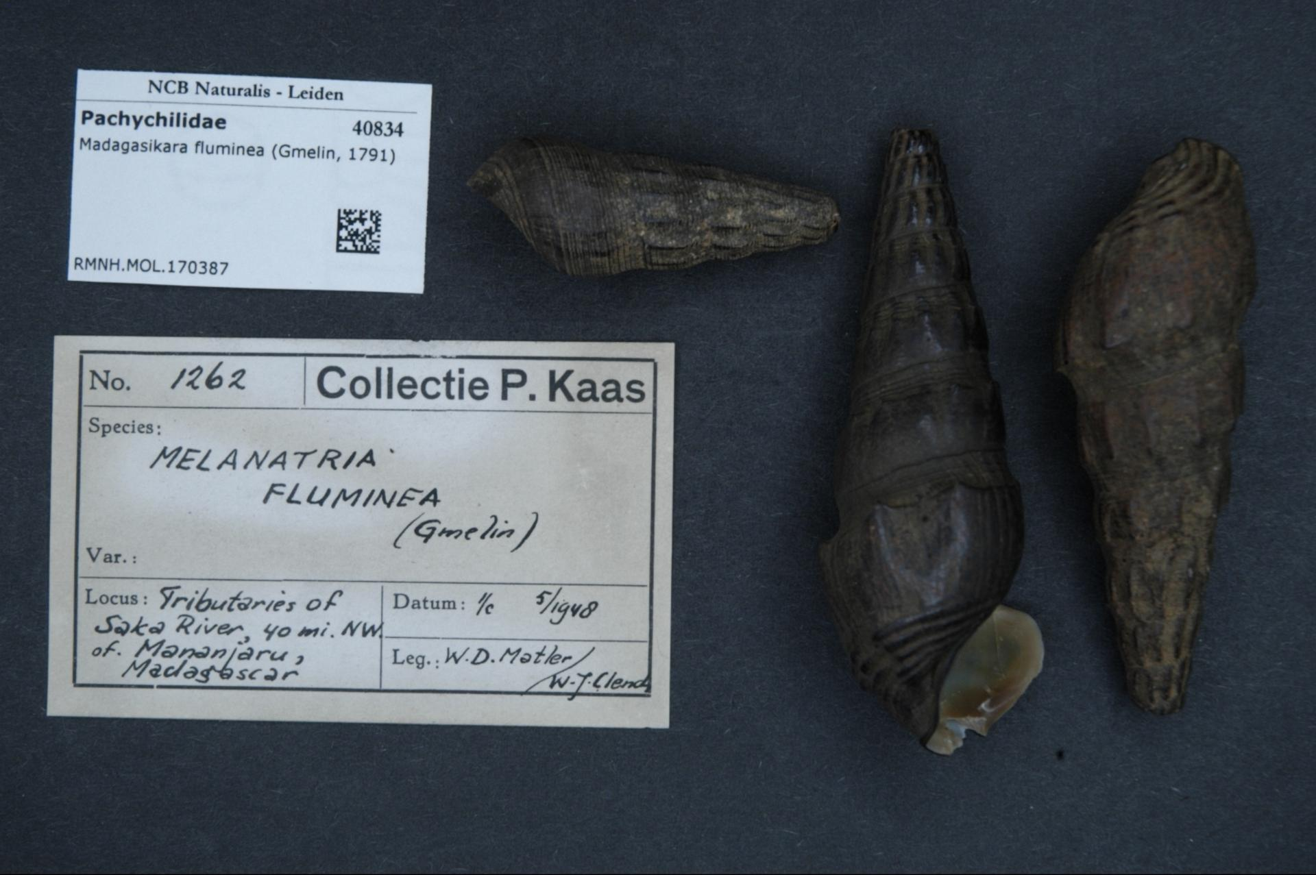 Madagasikara fluminea (Gmelin, 1791)